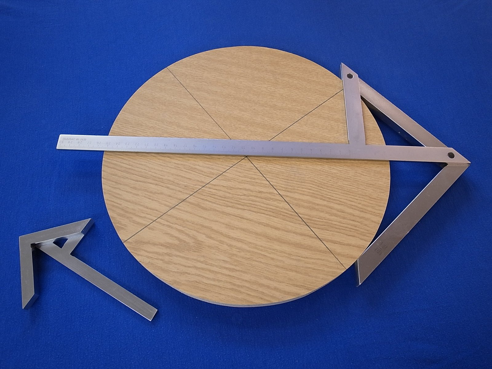 Zentrierwinkel_(Zentrumsfinder)